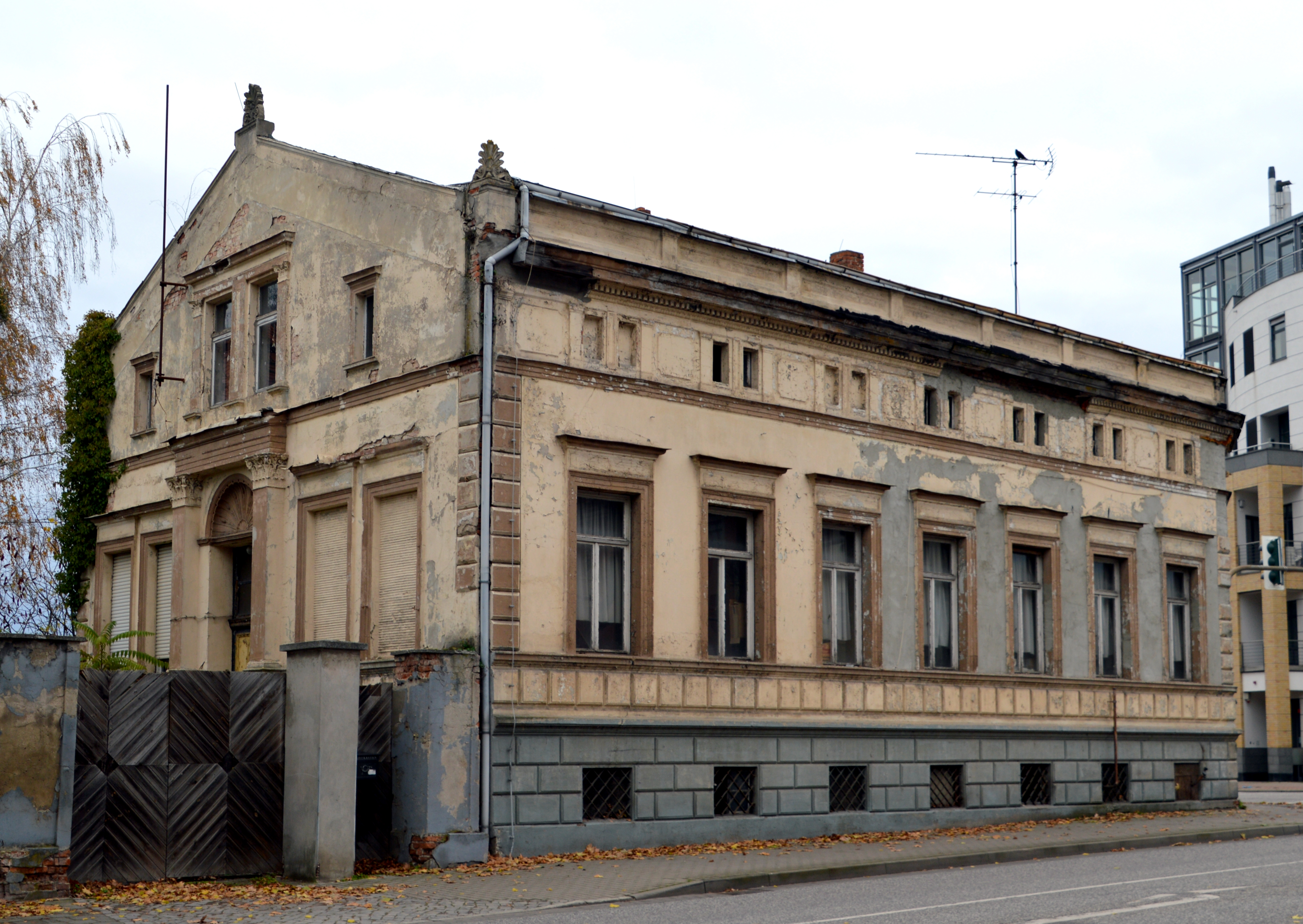 Wohnhaus Friedensplatz 12 Schönebeck} (Elbe)